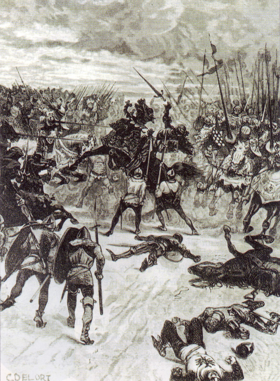 Morte Giovanni I di Lussemburgo durante la battaglia di Crecy